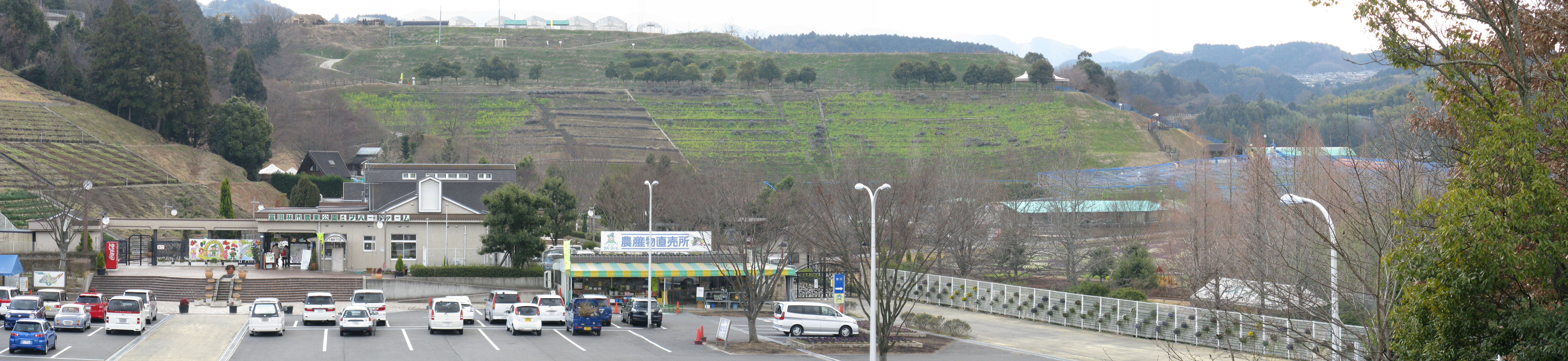 富田林市農業公園サバーファーム